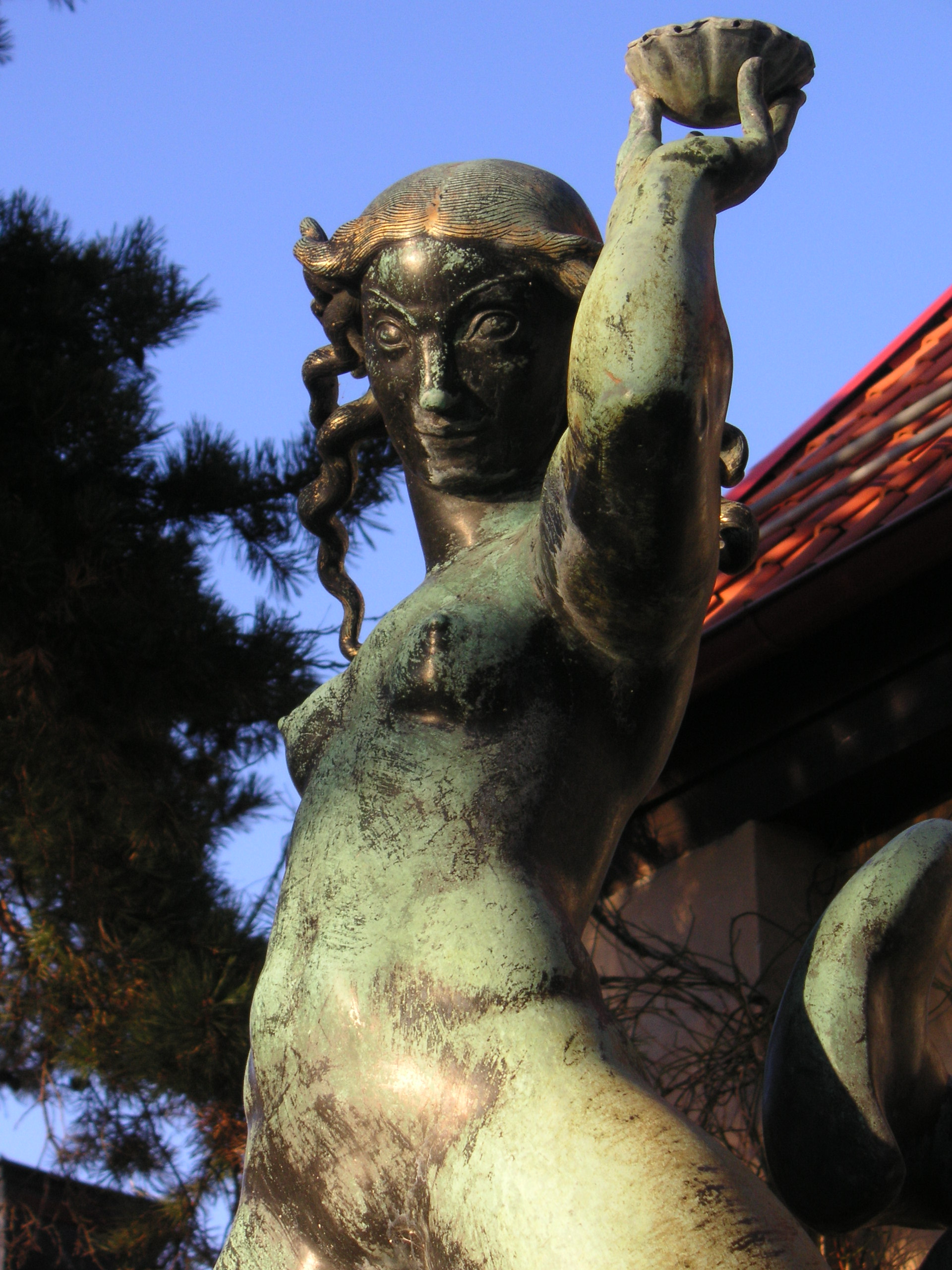 Carl Milles: "Najad med snäckor i handen"